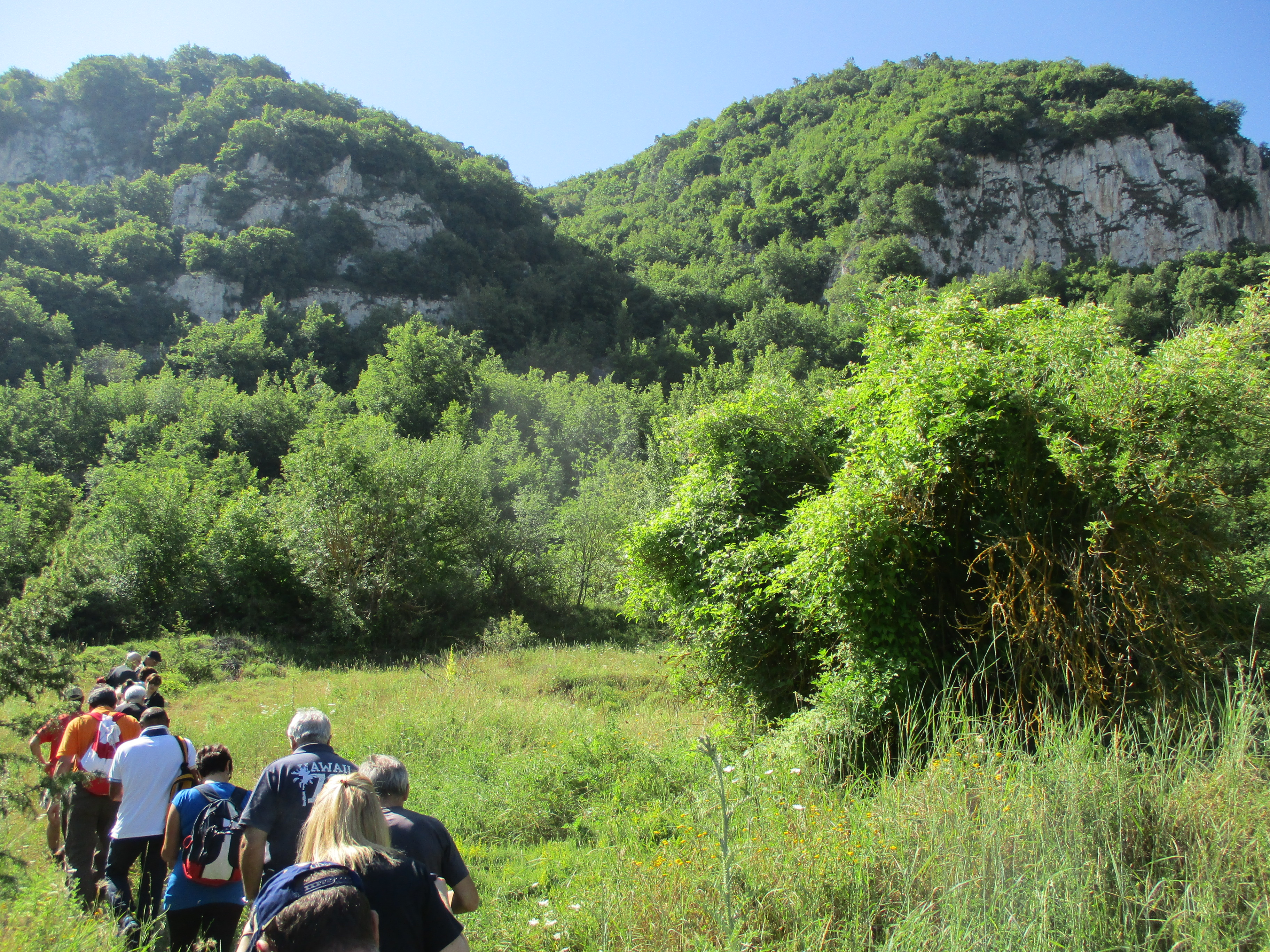 Visita guidata alle grotte